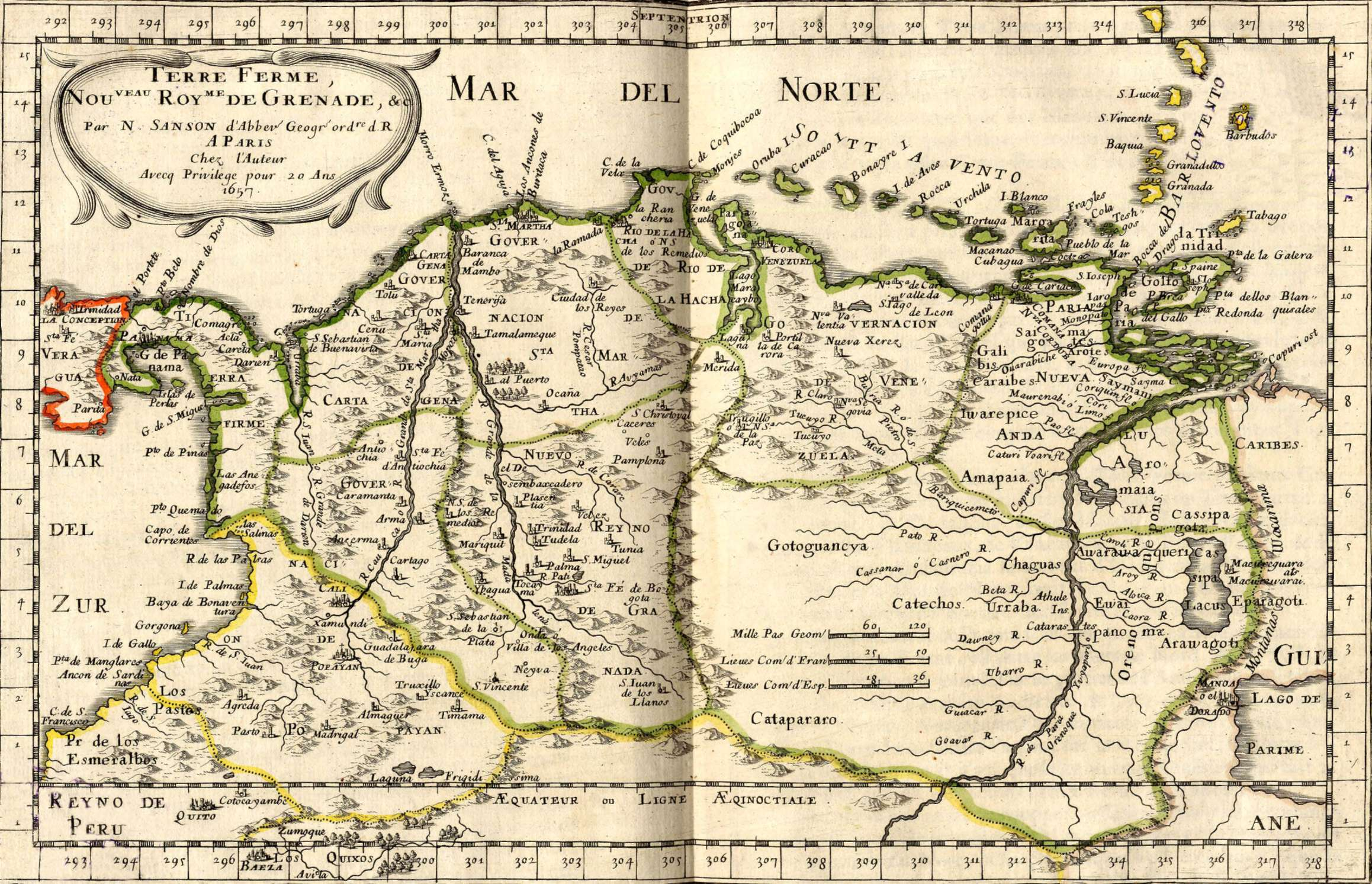 Mapa del Nuevo Reino de Granada y la Tierra Firme, 1657